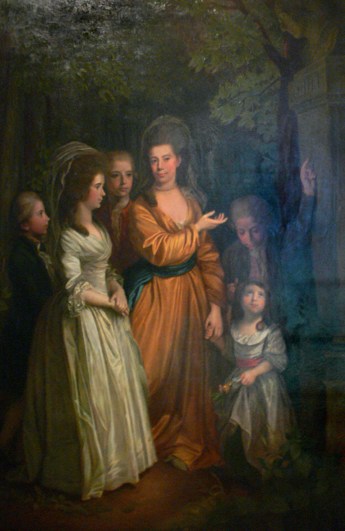 Sidonie Albertine Gräfin von Einsiedel mit fünf ihrer Kinder im Schlosspark Wolkenburg Schloßbergmuseum Chemnitz, Dauerleihgabe der Erbengemeinschaft nach Nikolaus von Welk